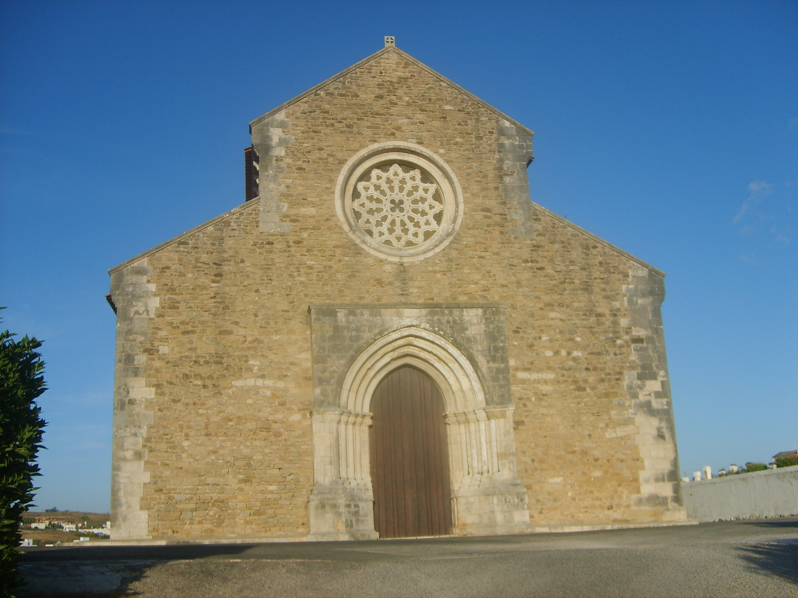 Lourinhã